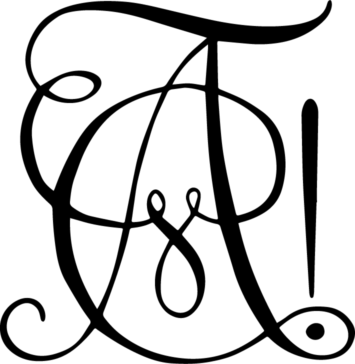 Zirkel der Studentenverbindung Fraternitas Artica zu Riga